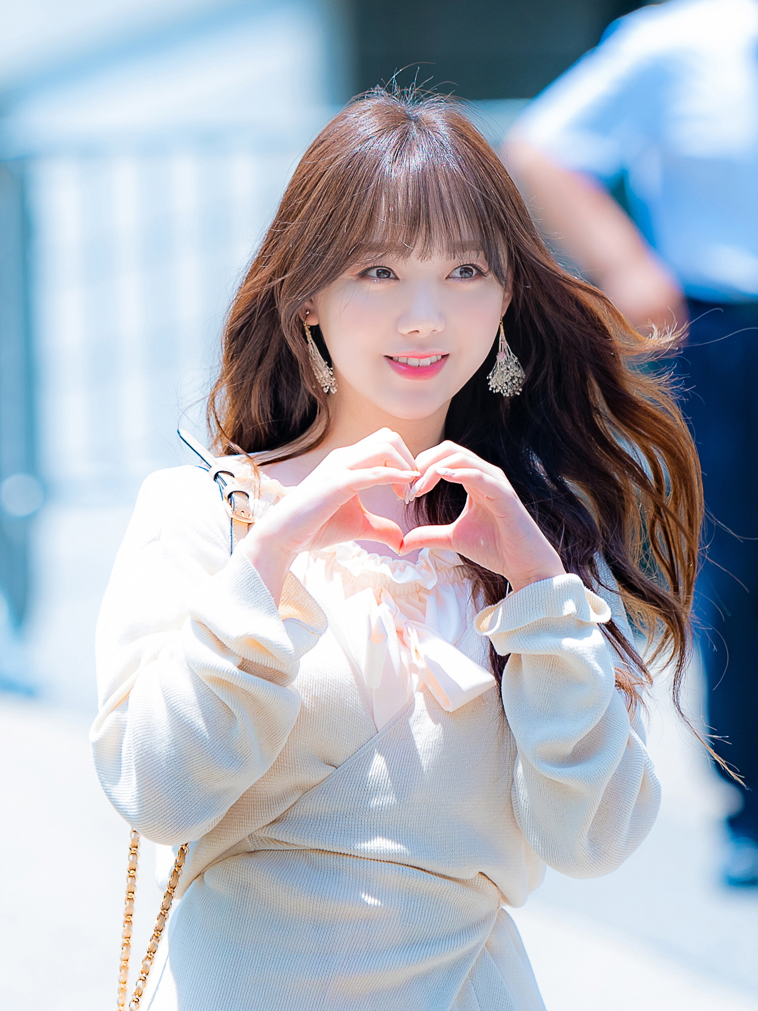 180615 뮤직뱅크 MC 출근